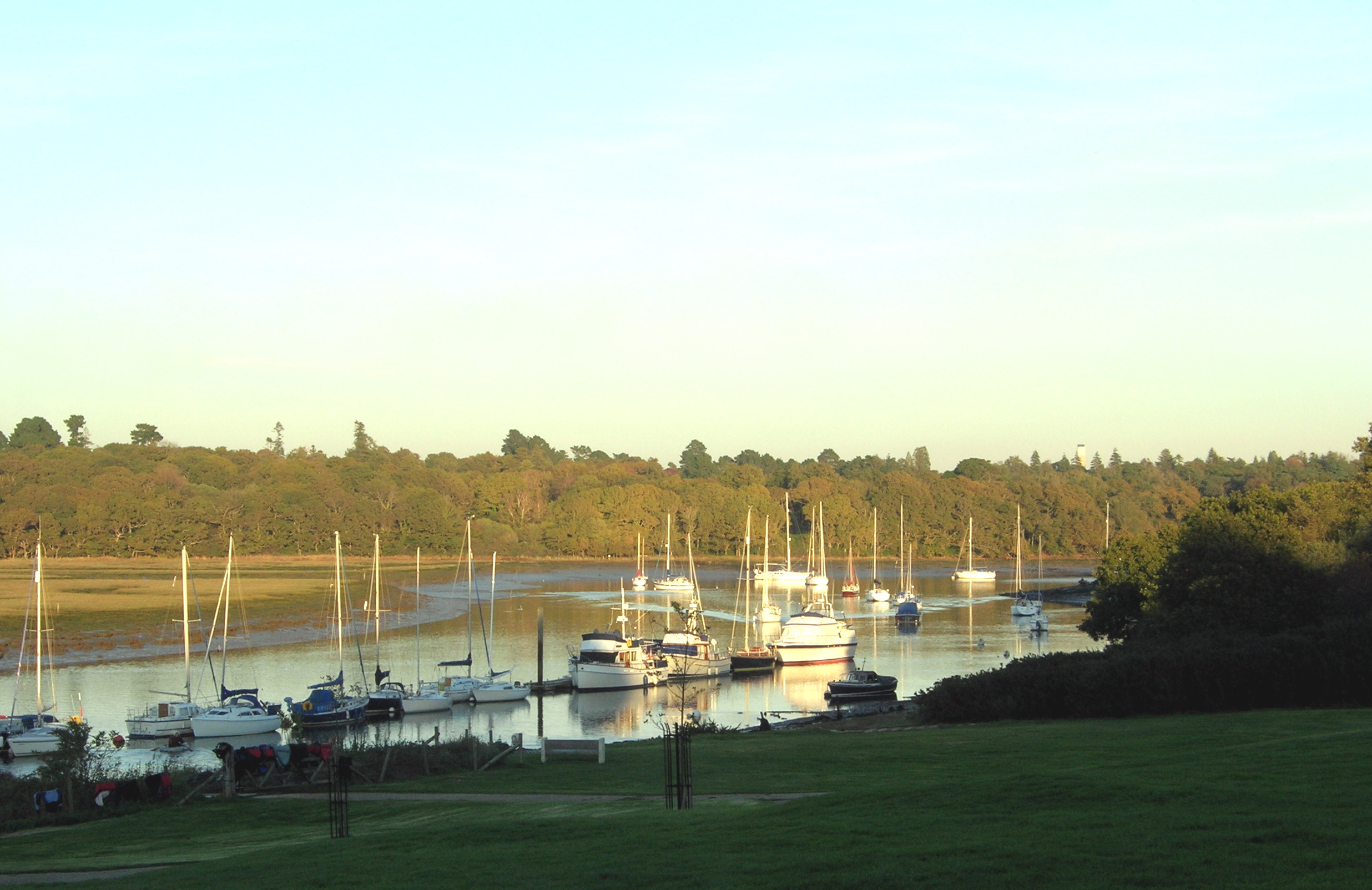 Description =Beaulieu River dans le Hampshire au sud de l'Angleterre Source =Photo taken by Remi Jouan Date =Novembre 2006 Author =Remi Jouan